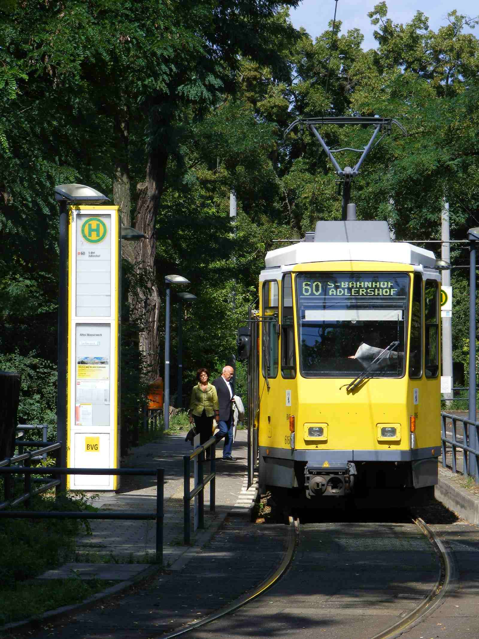 Tatra tram, Linie 60 Terminus, Berlin Friedrichshagen, Aug 2010